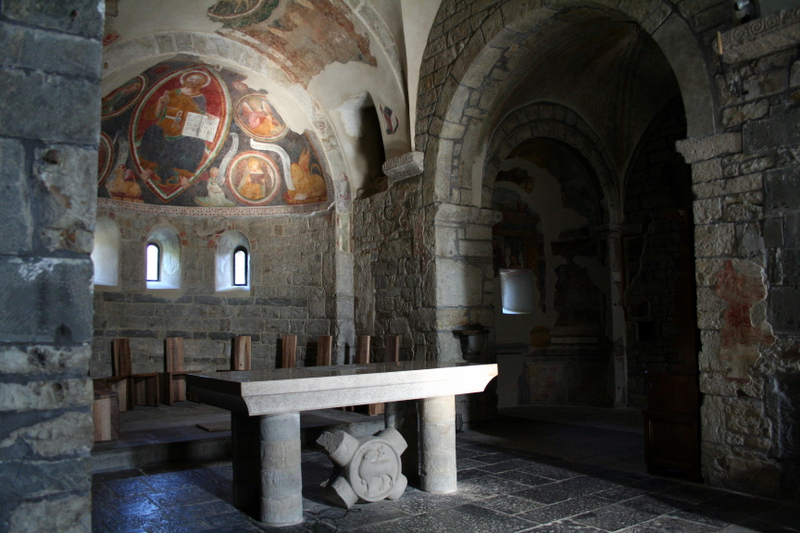 Abside del Priorato di Sant'Egidio (fontanella-BG)